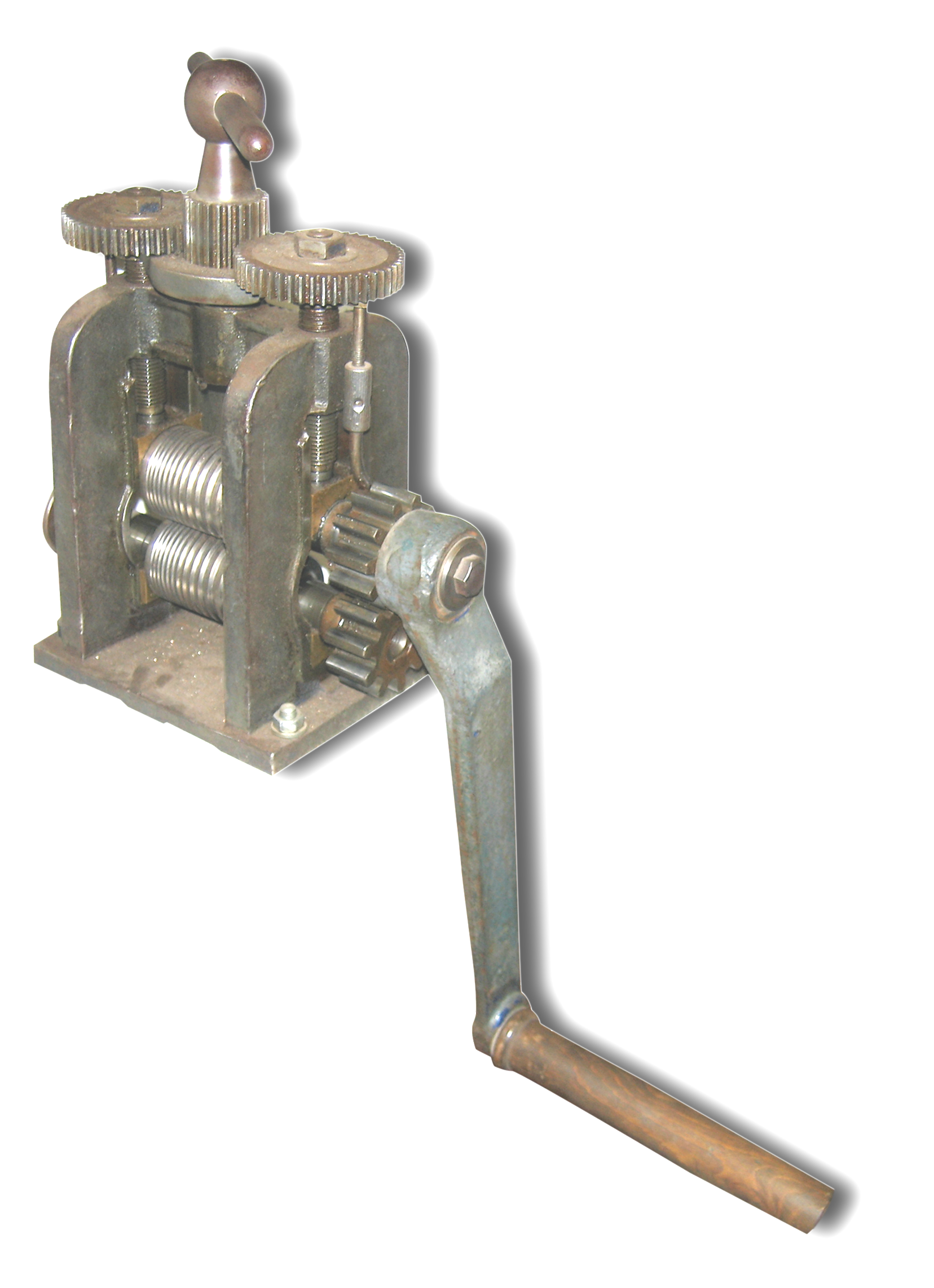 Laminoir à fils, outil de bijoutier source : l'Or de Vaise / photo : Dominique grassigli